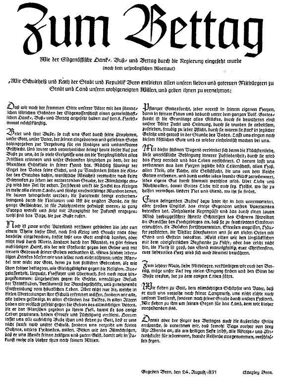 Aufruf der Berner Behörde zum Bettag von 1831. Public domain